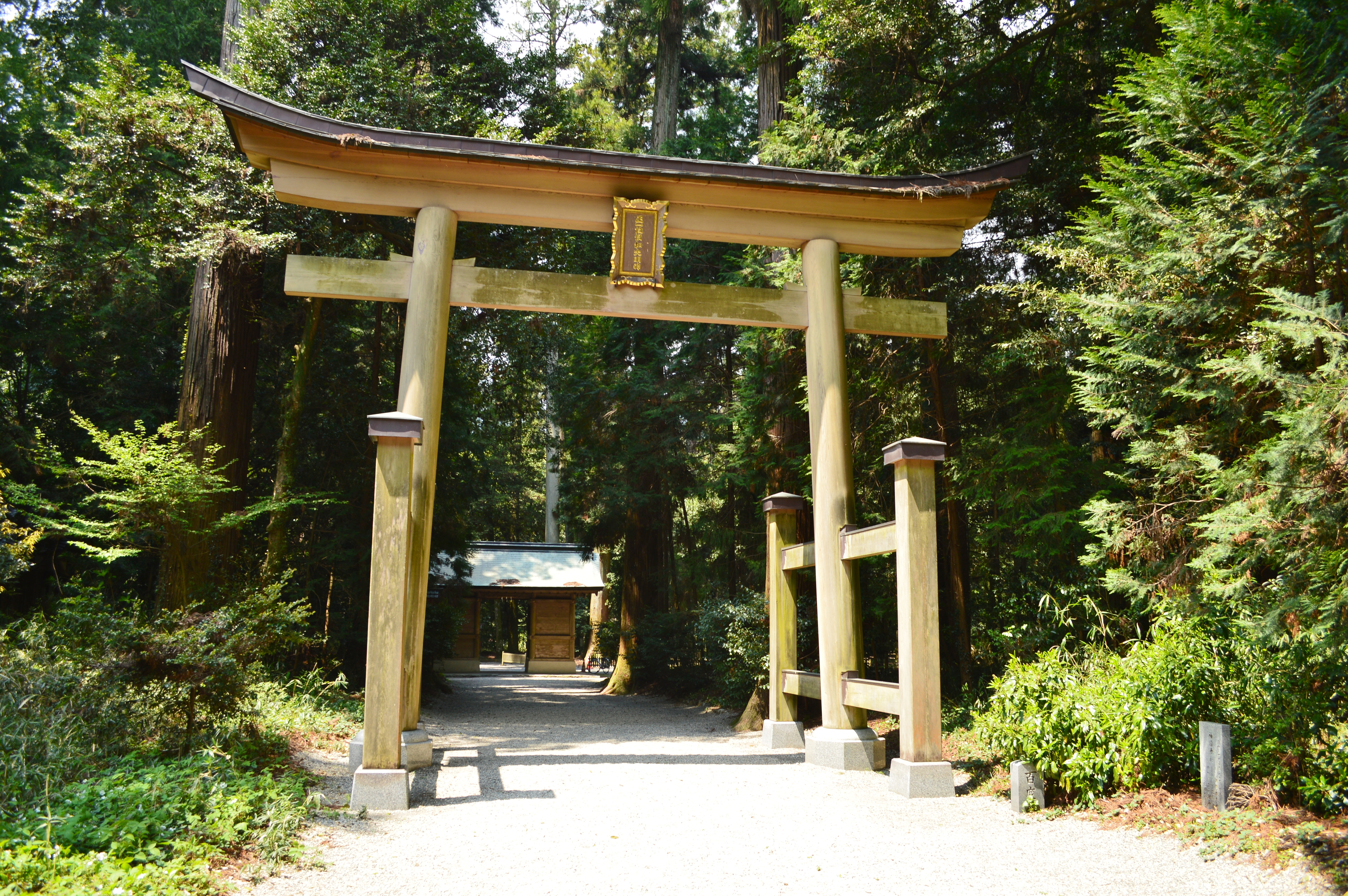 伊和神社 鳥居 Nikon D3200